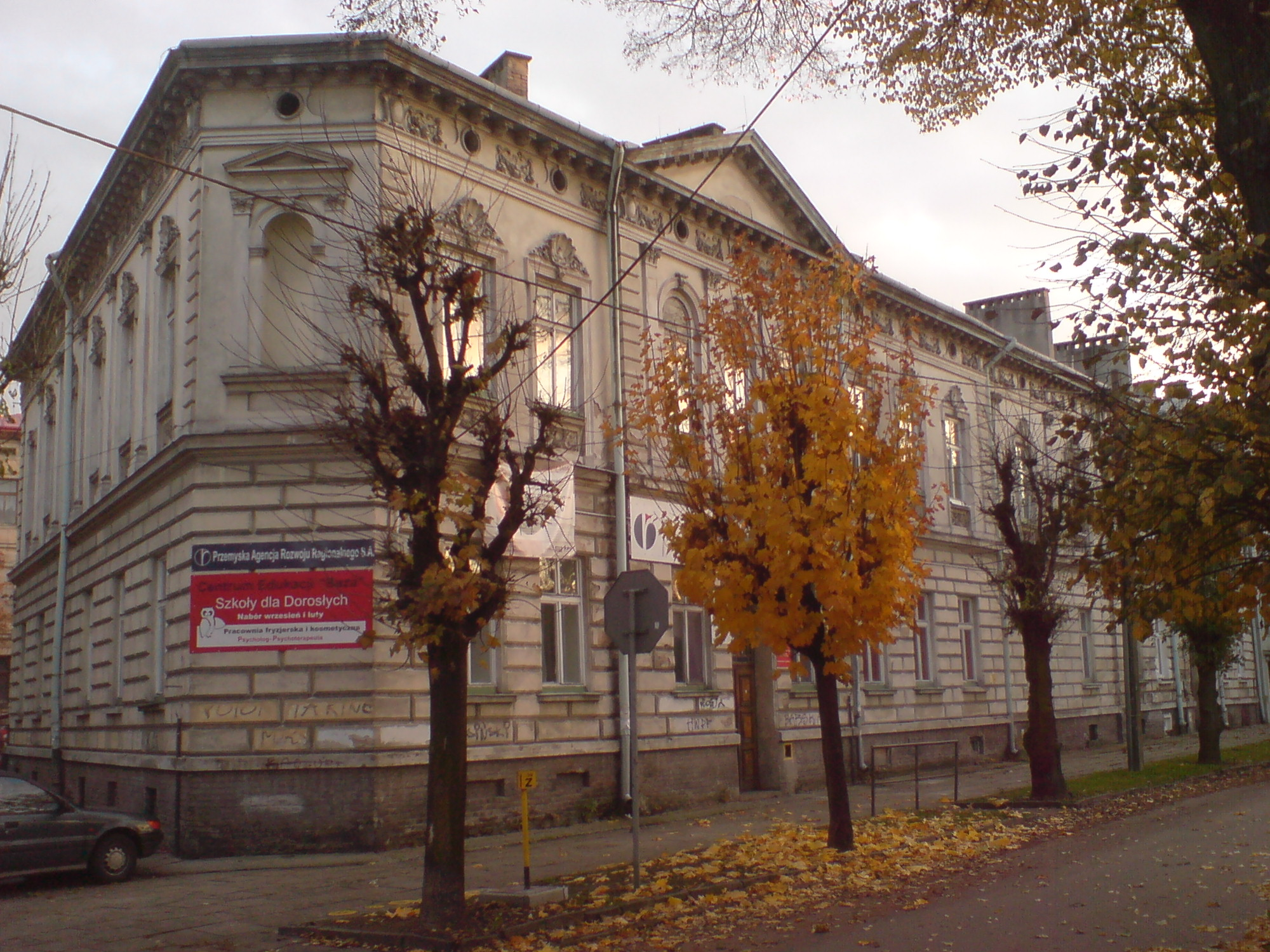 Budynek dawnego II gimnazjum klasycznego w Przemyślu, przy obecnej ulicy Piotra Skargi